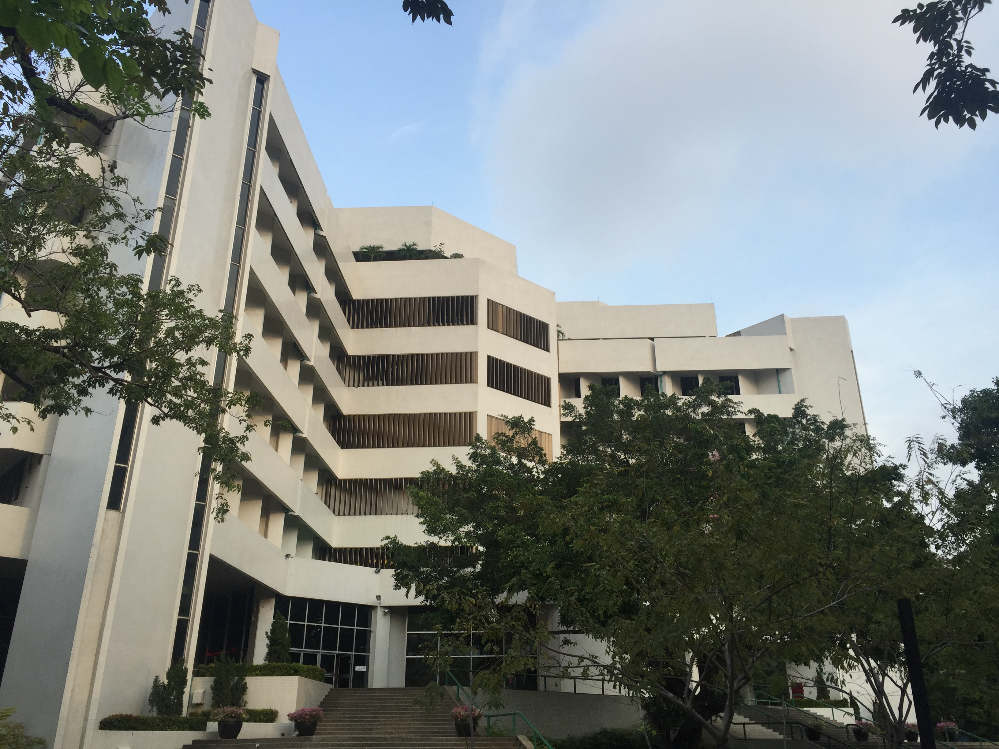 อาคารมหาธีรราชานุสรณ์ ที่ตั้งของสำนักงานวิทยทรัพยากร